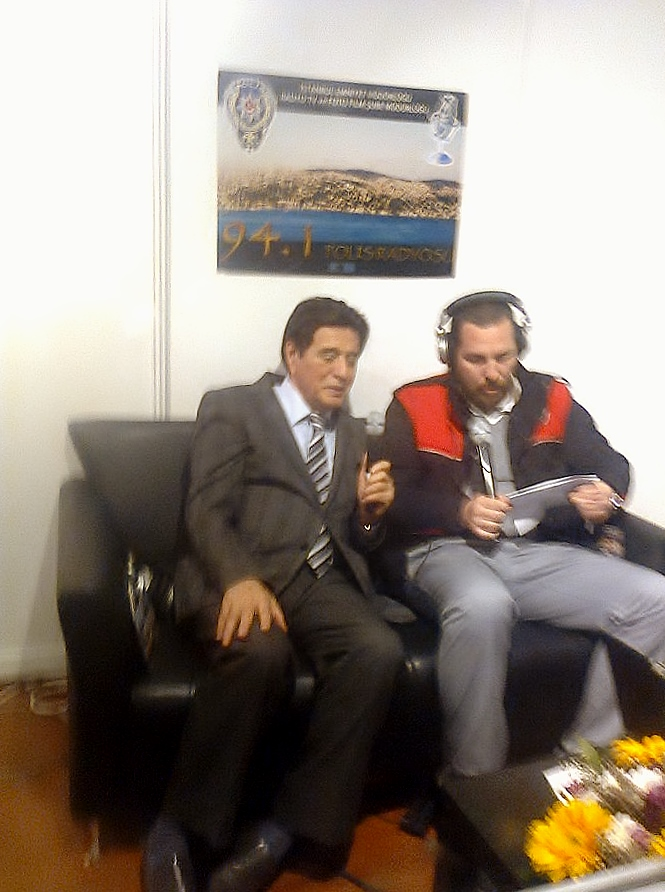 Taksim